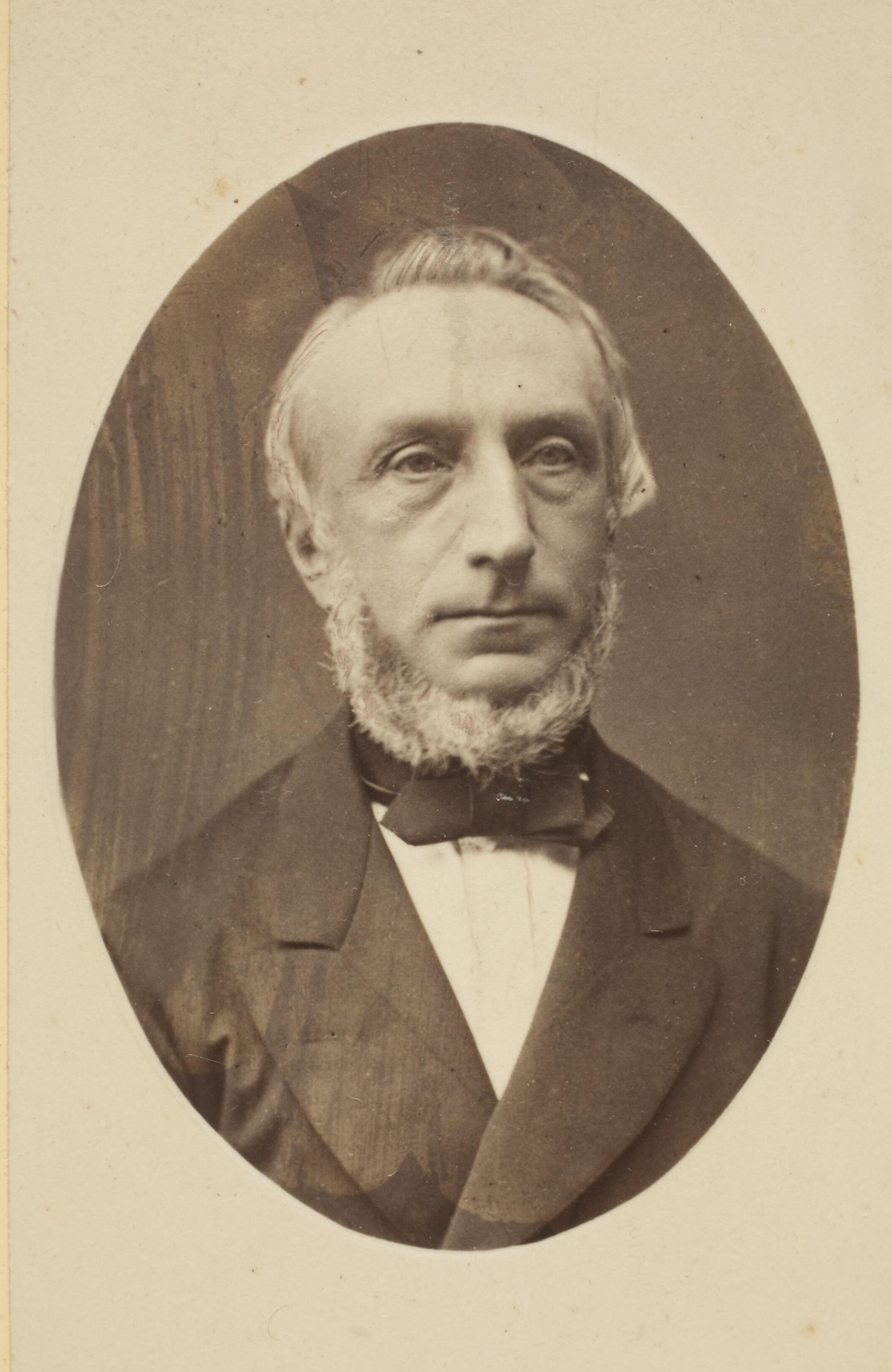 bewerkte uitsnede van een portret van Johannes Hermanus Gallee (1822-1901), burgemeester van Vorden